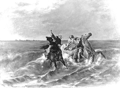 Fuite de Gradlon par Evariste-Vital Luminais. Avant 1884, huile sur toile, H. x L. : 0,545 x 0,732 m, non signé. Achat auprès d'Henri Belbeoch en 1993. Musée des Beaux-Arts de Quimper. Il s'agit d'une des esquisses de la Fuite de Gradlon, exposé au Salon de 1884. Les musées des beaux-arts de Rennes et de Nantes en conservent d'autres versions préparatoires.